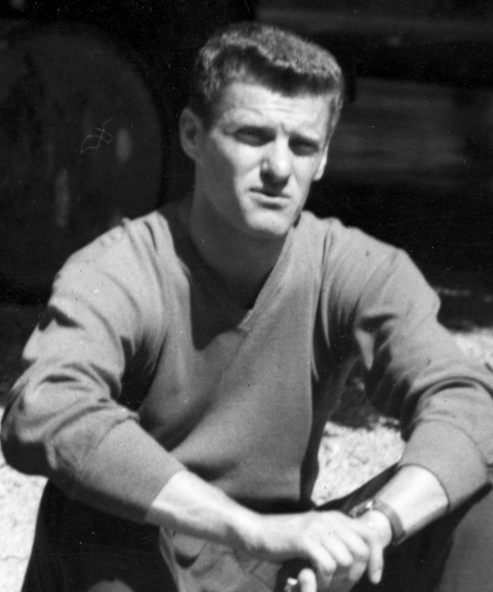 Sipos Ferenc magyar labdarúgó, edző.